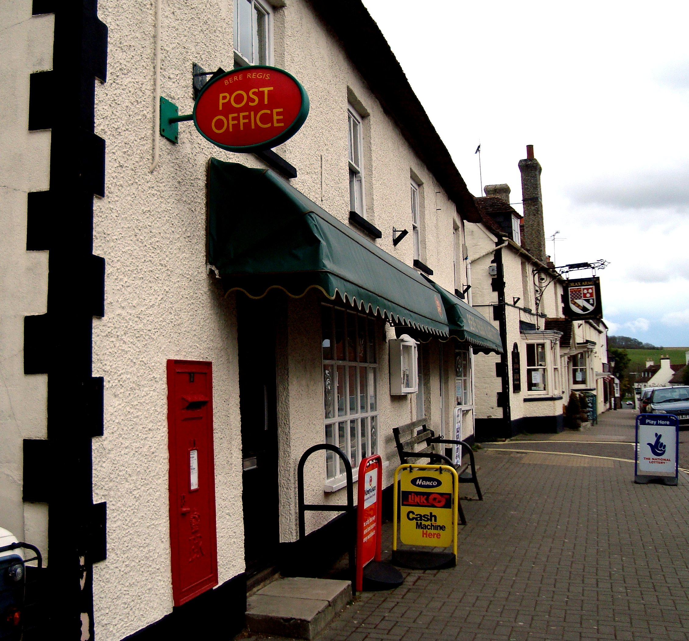 Bere Regis, Dorset ... Post Office.